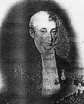 Auguste Chevandier (1781-1865), père d'Eugène Chevandier de Valdrome